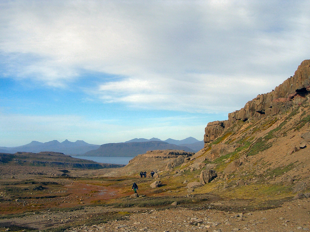 Port Couvreux, Kerguelen Islands